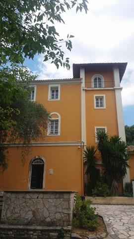 Εθνική Πινακοθήκη-Μουσείο Αλεξάνδρου Σούτζου, Παράρτημα Κέρκυρας (Κάτω Κορακιάνα, Καστελλίνο)